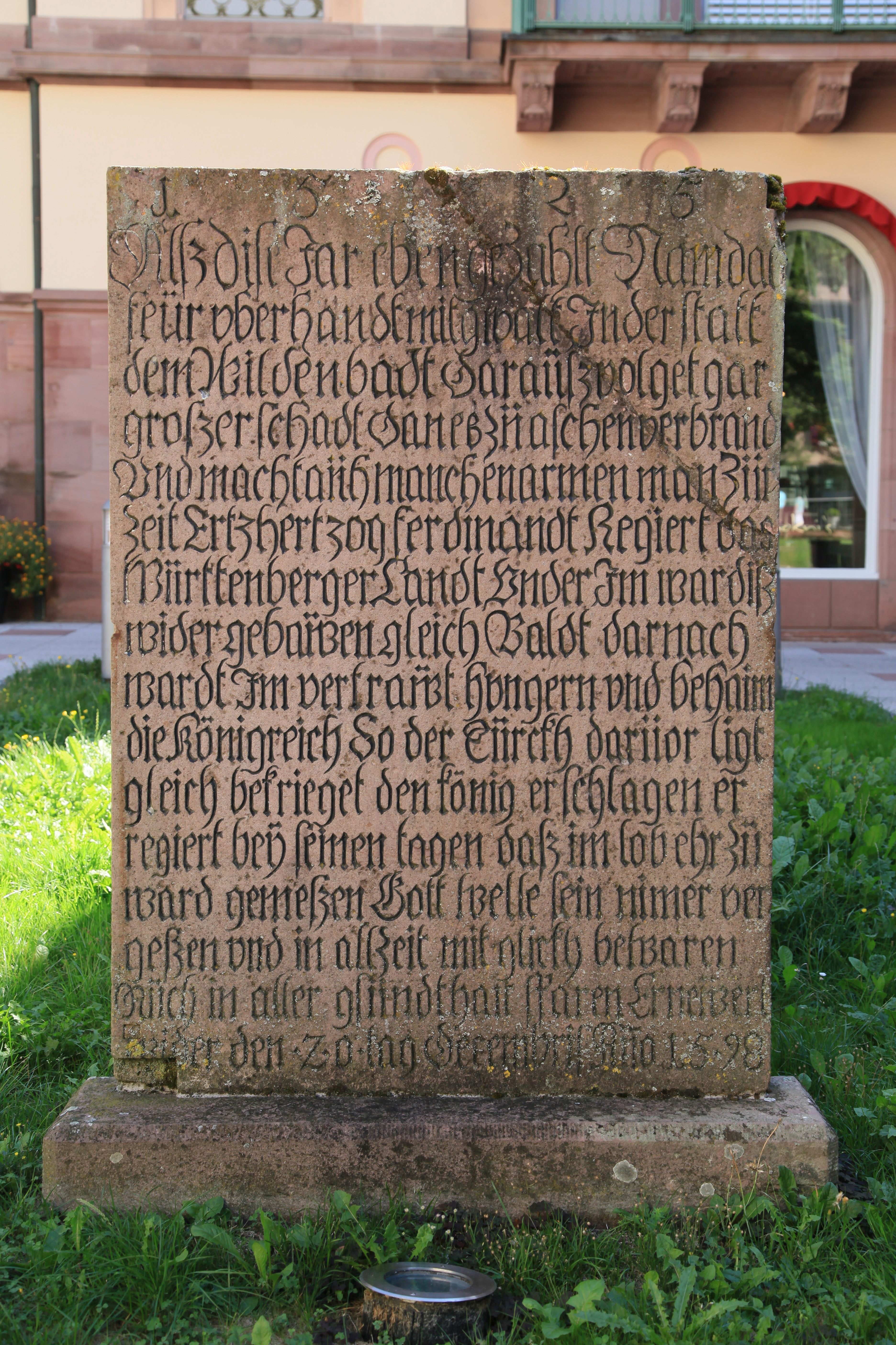 Ferdinandstein, Kurplatz in Bad Wildbad